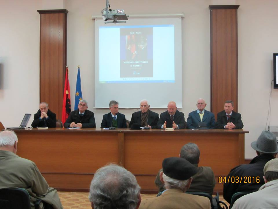 Në promovimin e librit “Memoria historike” dhe “Kazazët e Durrësit”